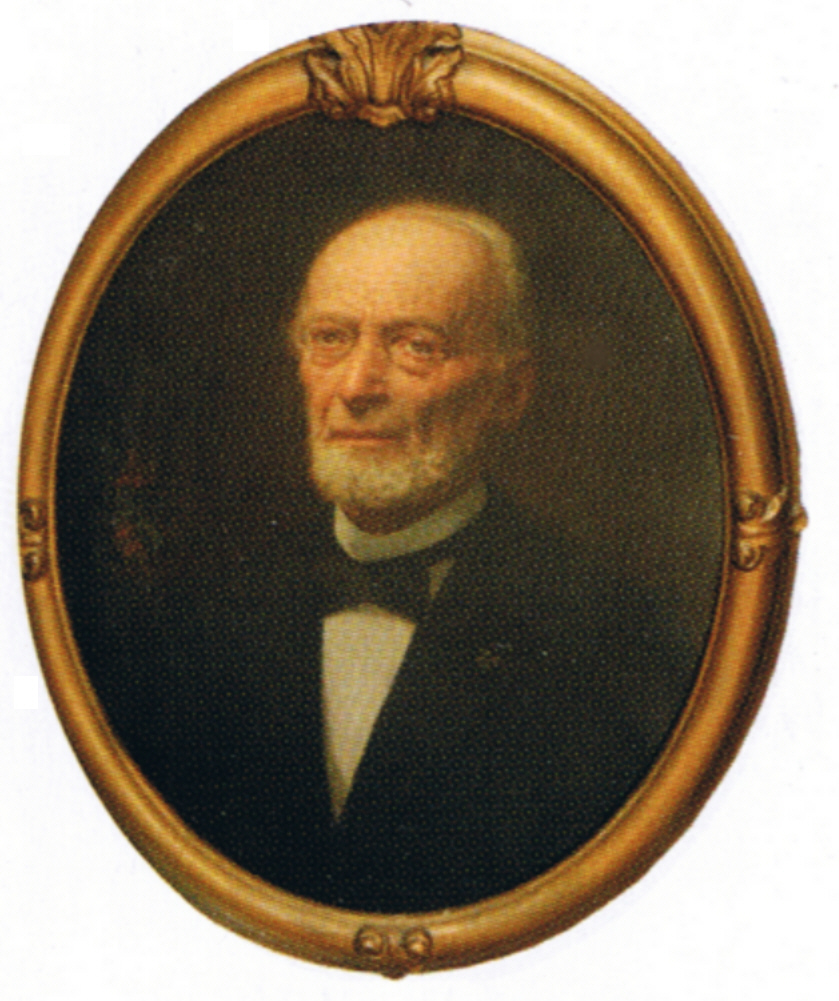 (Carl) Wilhelm von Ahlefeld(t) (1818-1897), Herr auf Treuholz und Wirklicher Geheimer Rat, Landesdirektor, Mitglied der Regierung in Plön und Klosterprobst von Uetersen